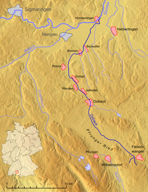 Verlaufskarte Ostrach